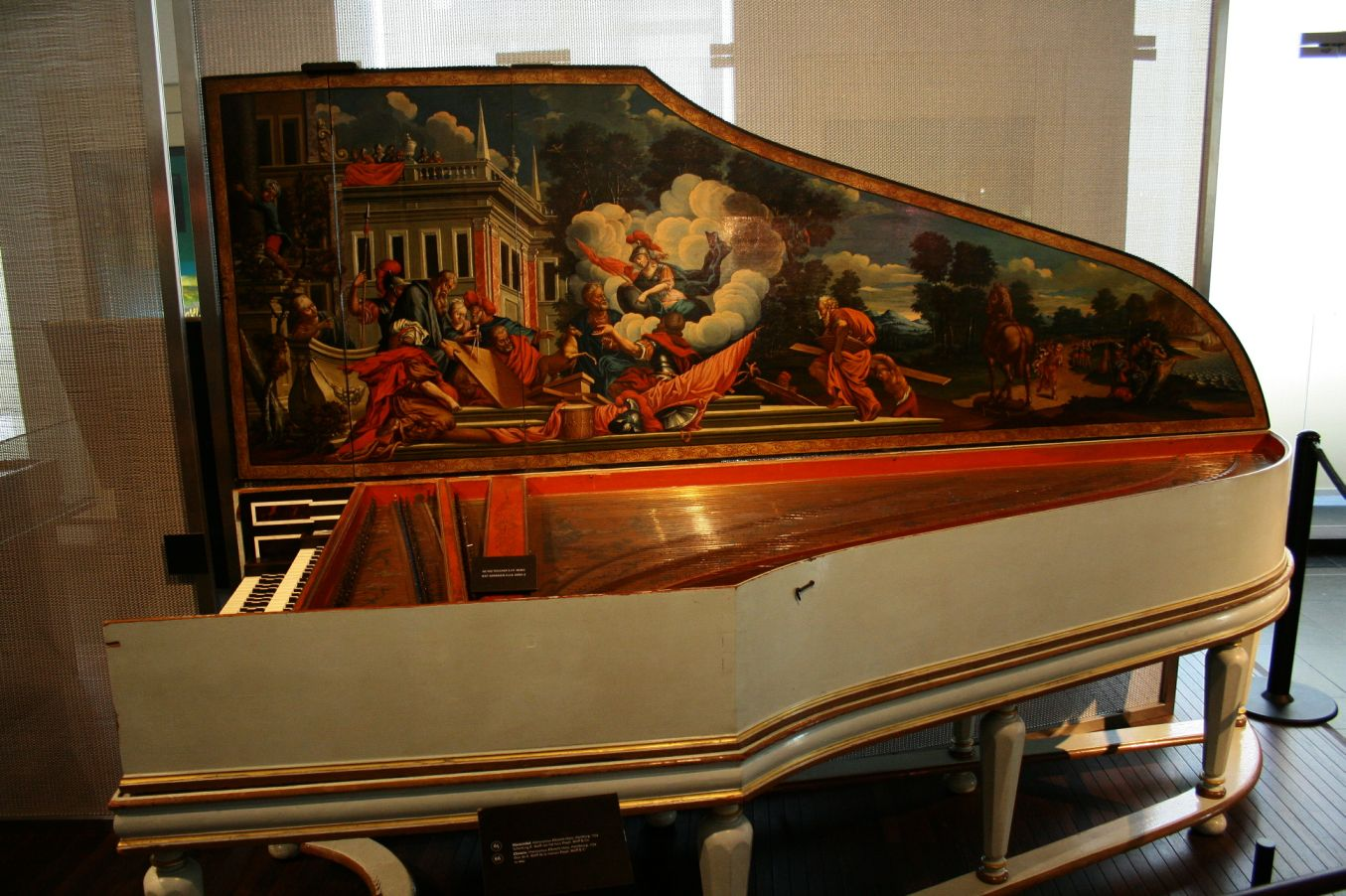 Clavecin par Hieronymus Hass - 1734 - Bruxelles - Musée des Instruments de Musique